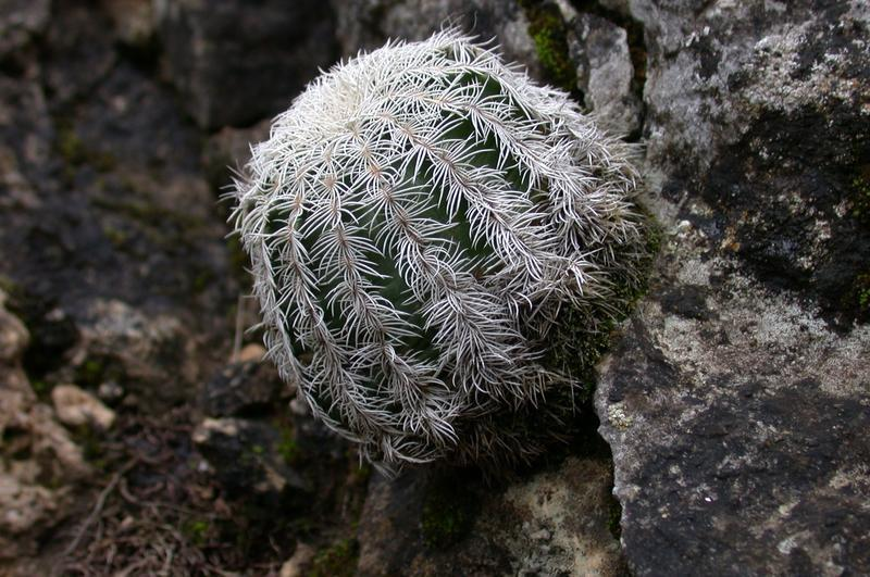 Lace Cactus (Echinocereus reichenbachii) side view